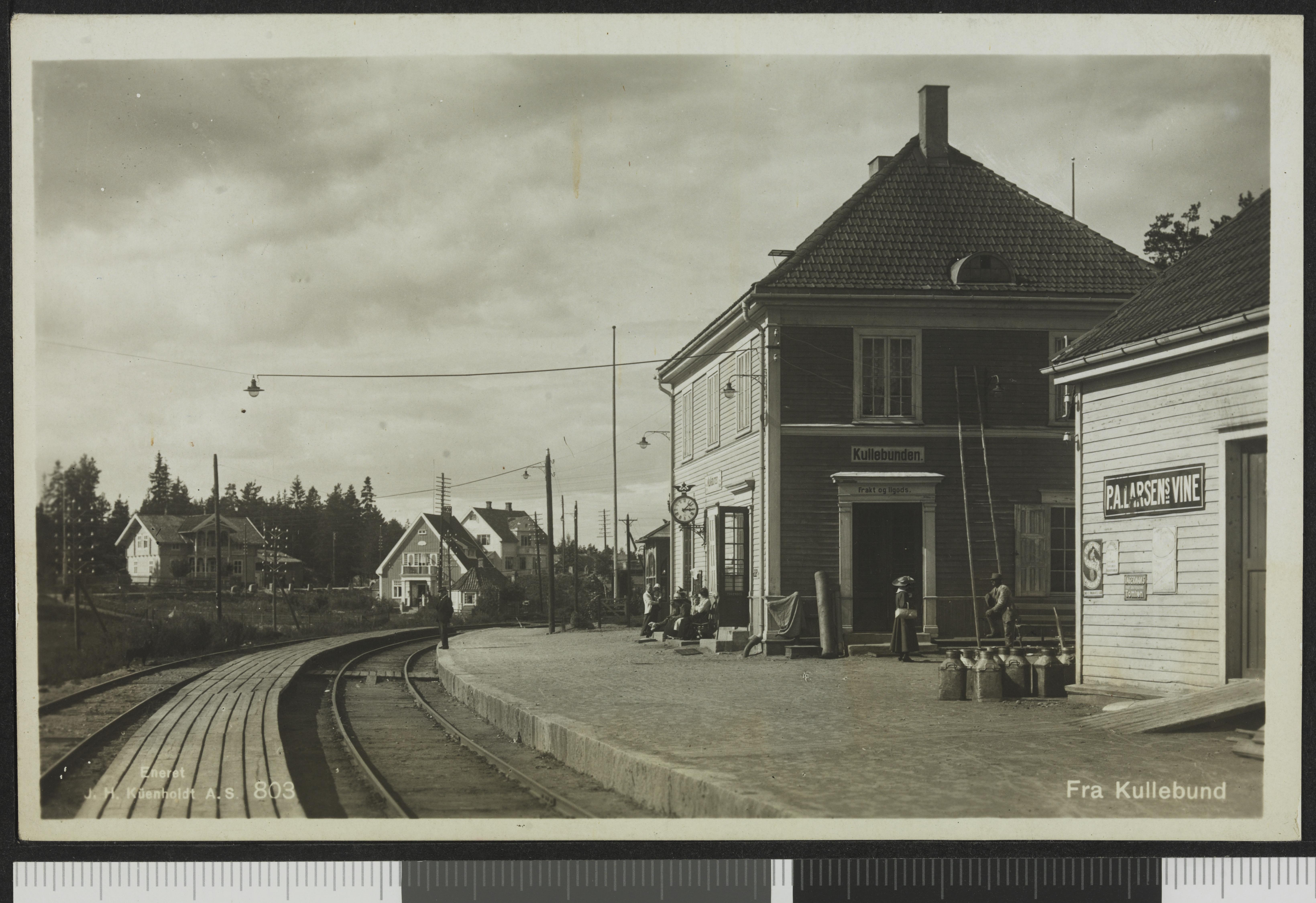 Bildet er hentet fra Nasjonalbibliotekets bildesamling Kolbotn,Kolbotn stasjon, Oppegård, Akershus